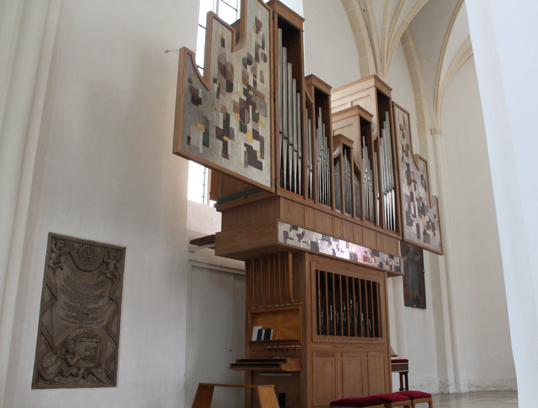 Chororgel von St. Georg in Freising (1970, Sandtner op. 6, II/12)